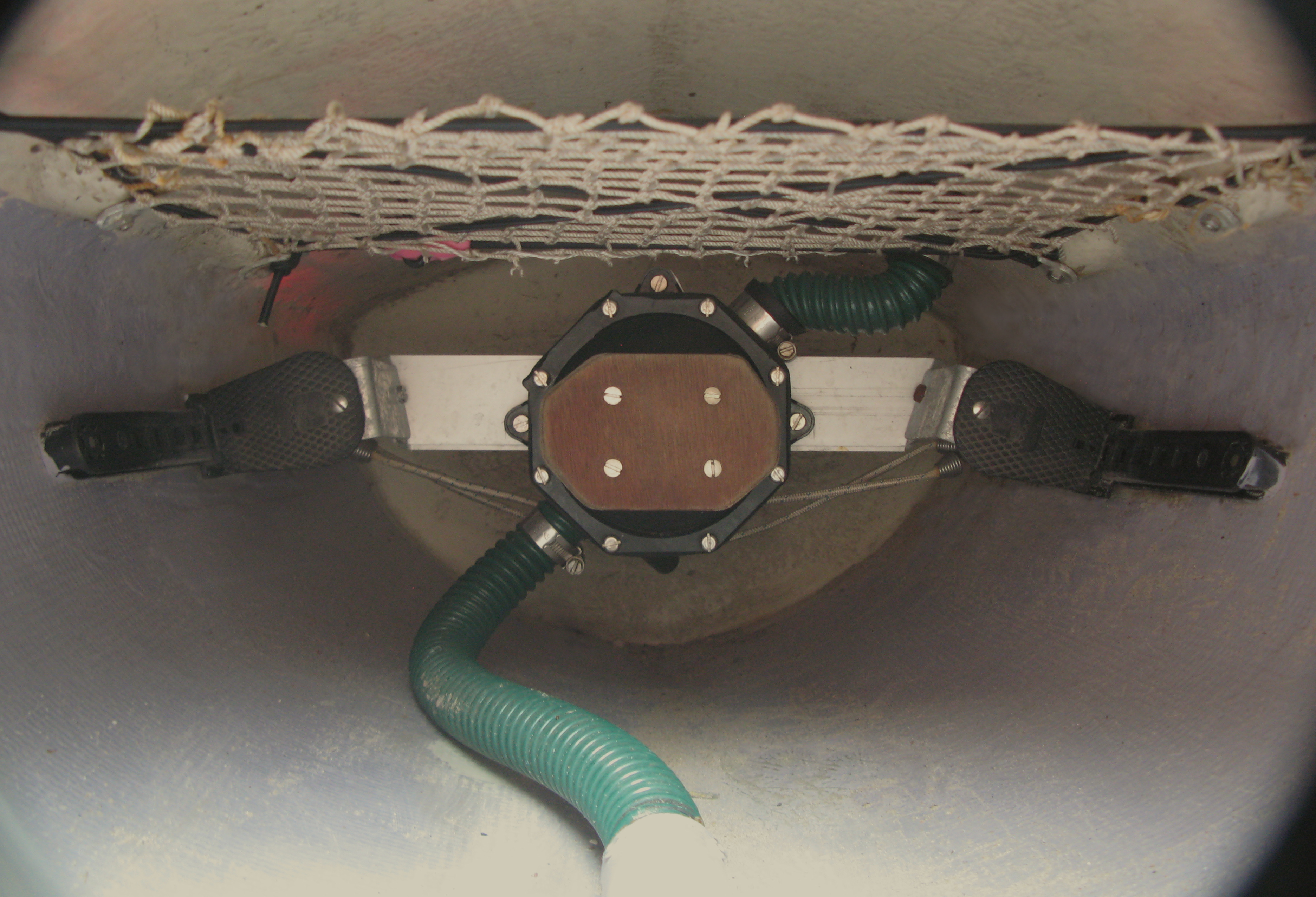 Seekajak, Detail - fest eingebaute Fußpumpe